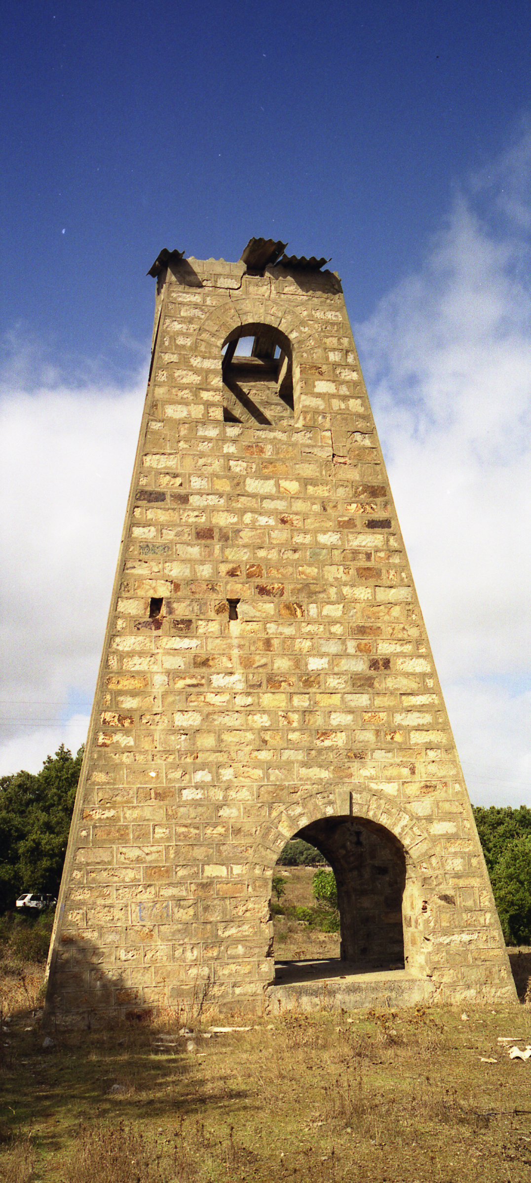 arbus, west sardinia, Bidderdi, Italy.